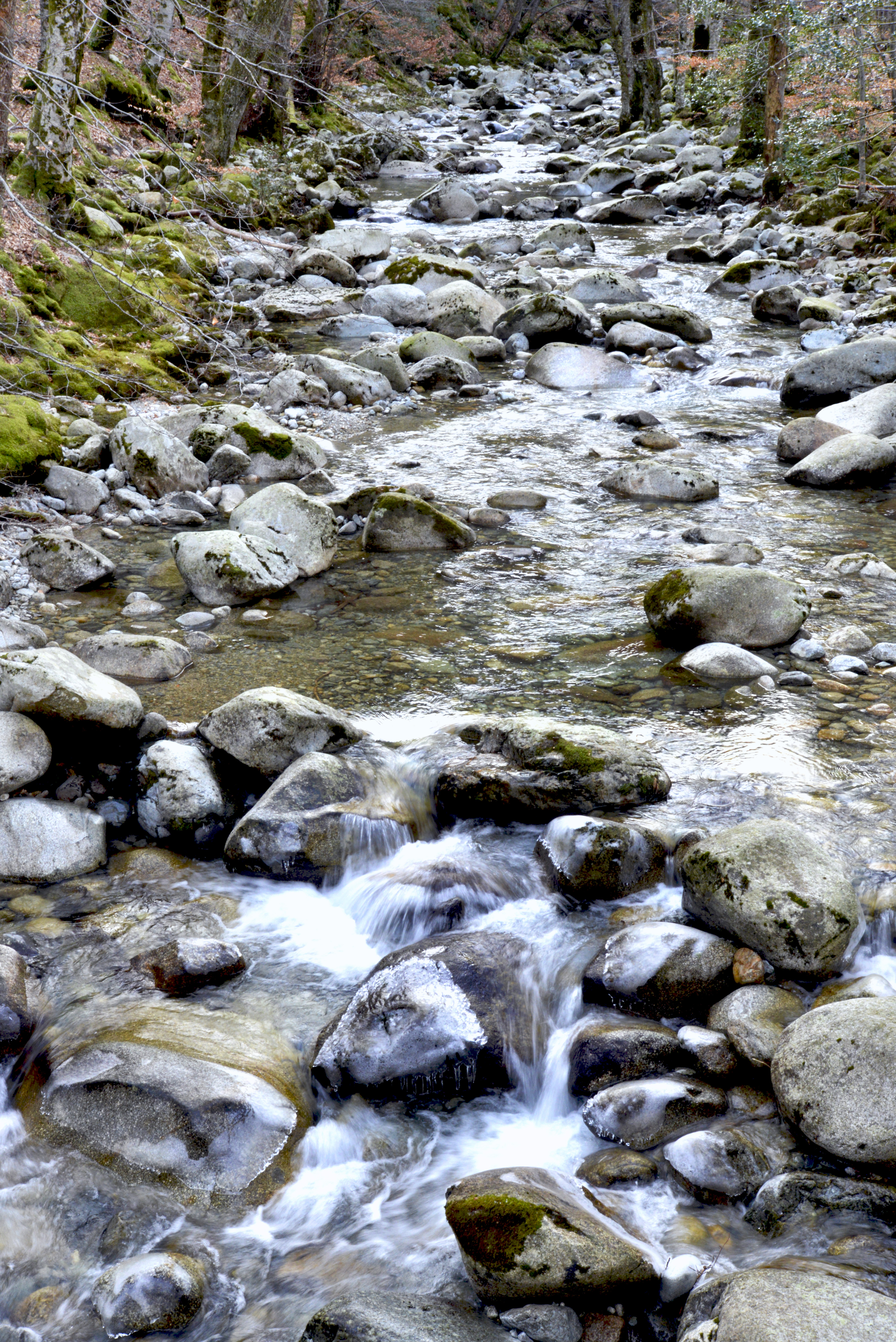 Vivario, Centre Corse (Haute-Corse) - L'Agnone, ruisseau de la Cascade des Anglais qui se jette un peu plus bas dans le Vecchio, en amont du pont de la piste partant de la maison forestière de Vizzavona.